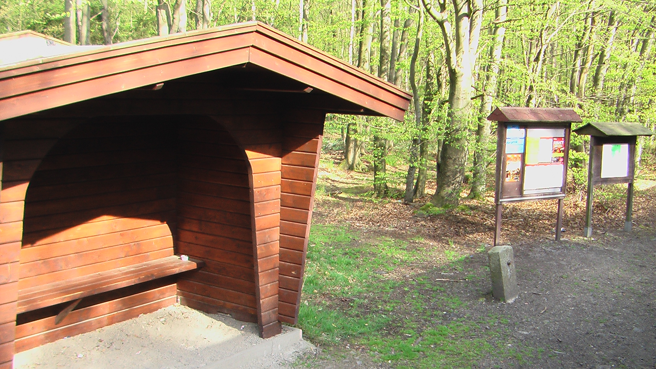 Haltepunt Sternhaus-Ramberg. Foto genomen vanuit de trein.